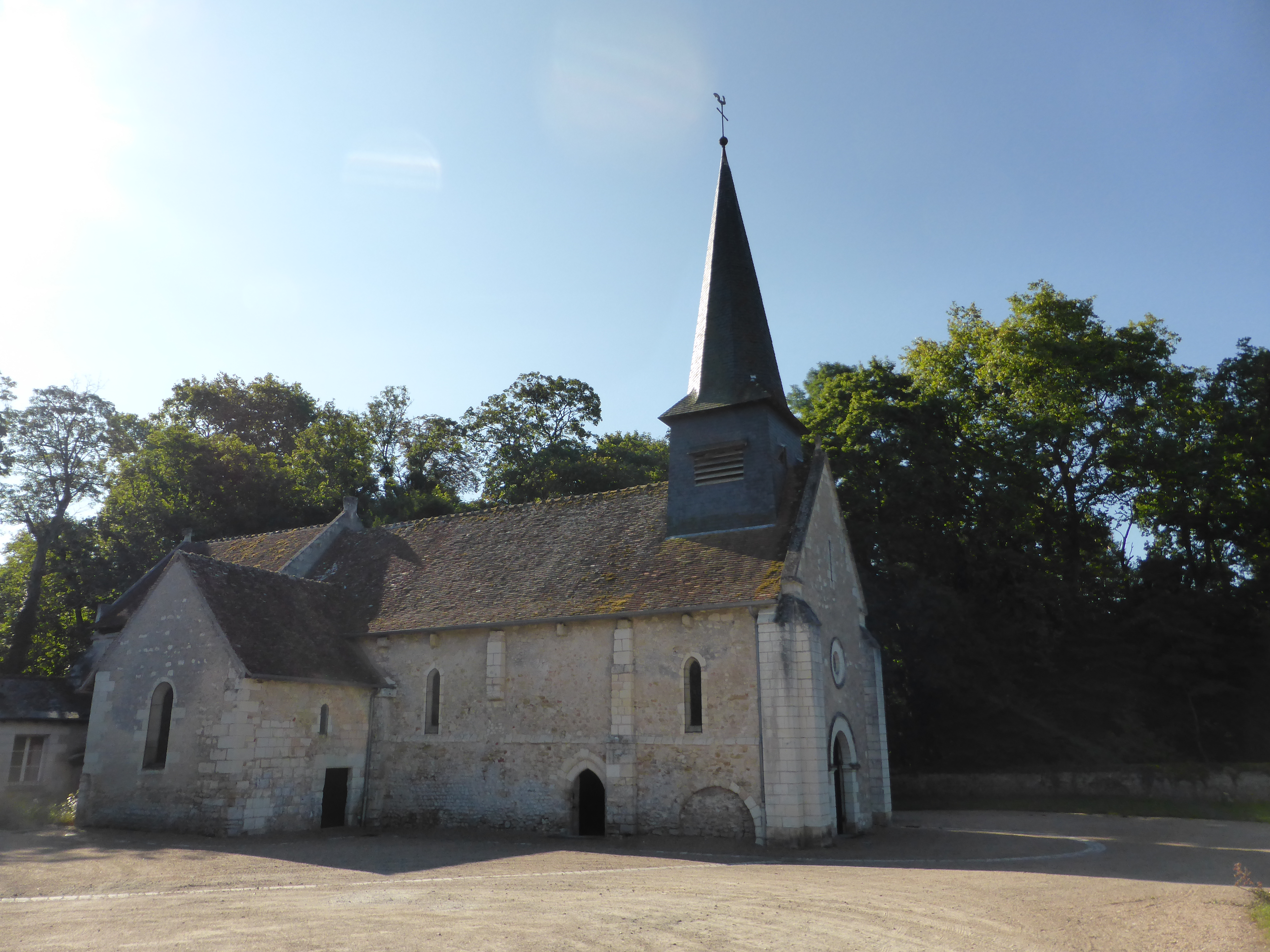 Église Saint-Germain de Civray-de-Touraine, en Indre-et-Loire. .